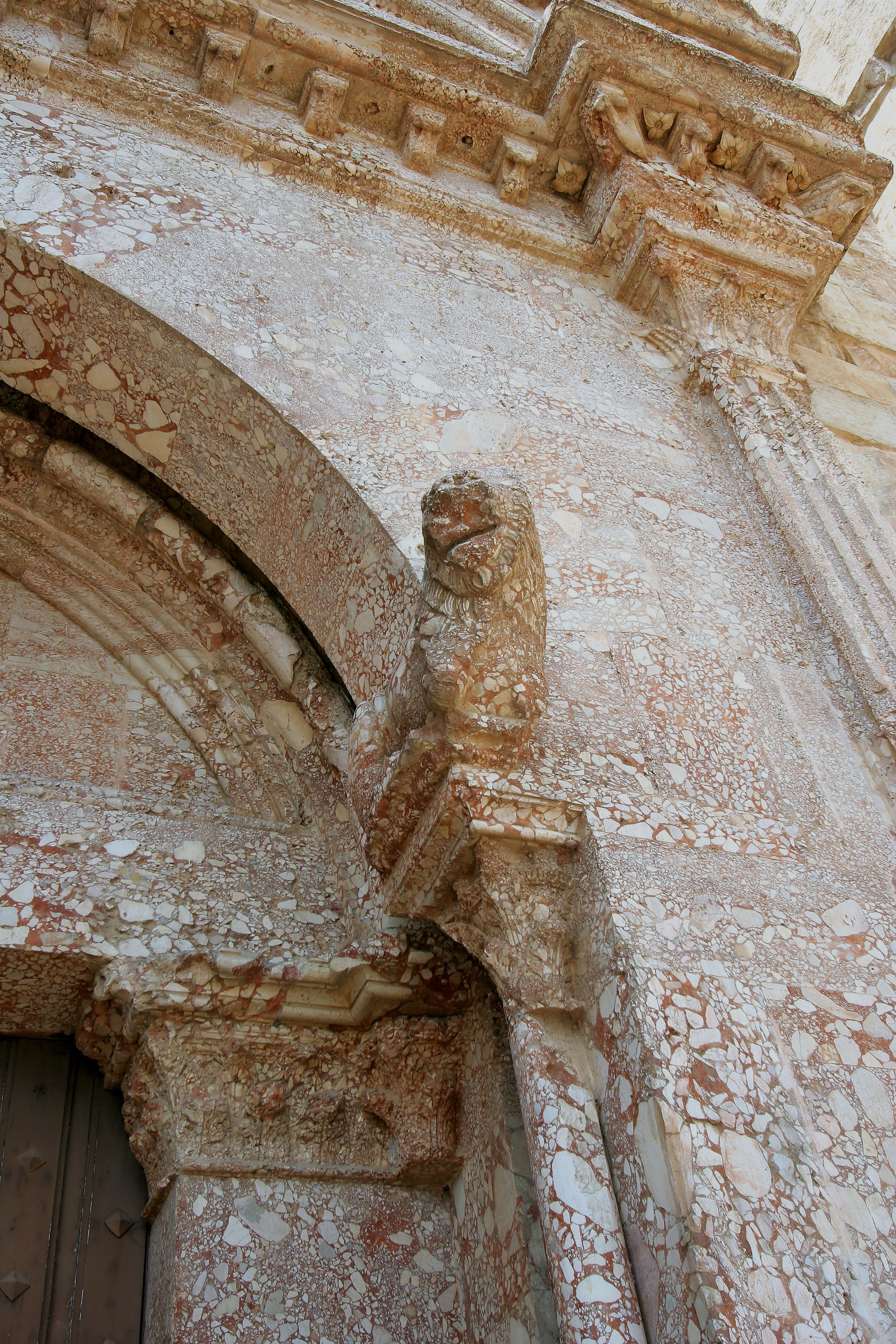 Entrance